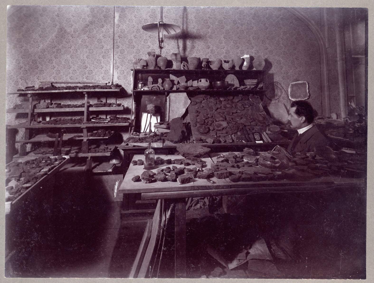 Józef Hilary Nowalski